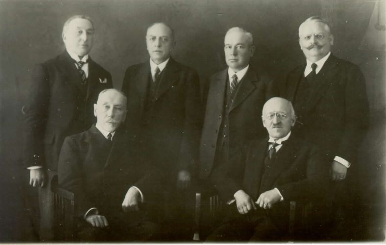 Senatorji dravske banovine. Sedita Ivan Hribar in Miroslav Ploj, stojijo od leve na desno: dr. Vladimir Ravnihar, podpredsednik senata dr. Fran Novak, dr. Janko Rajar, dr. Valentin Rožič